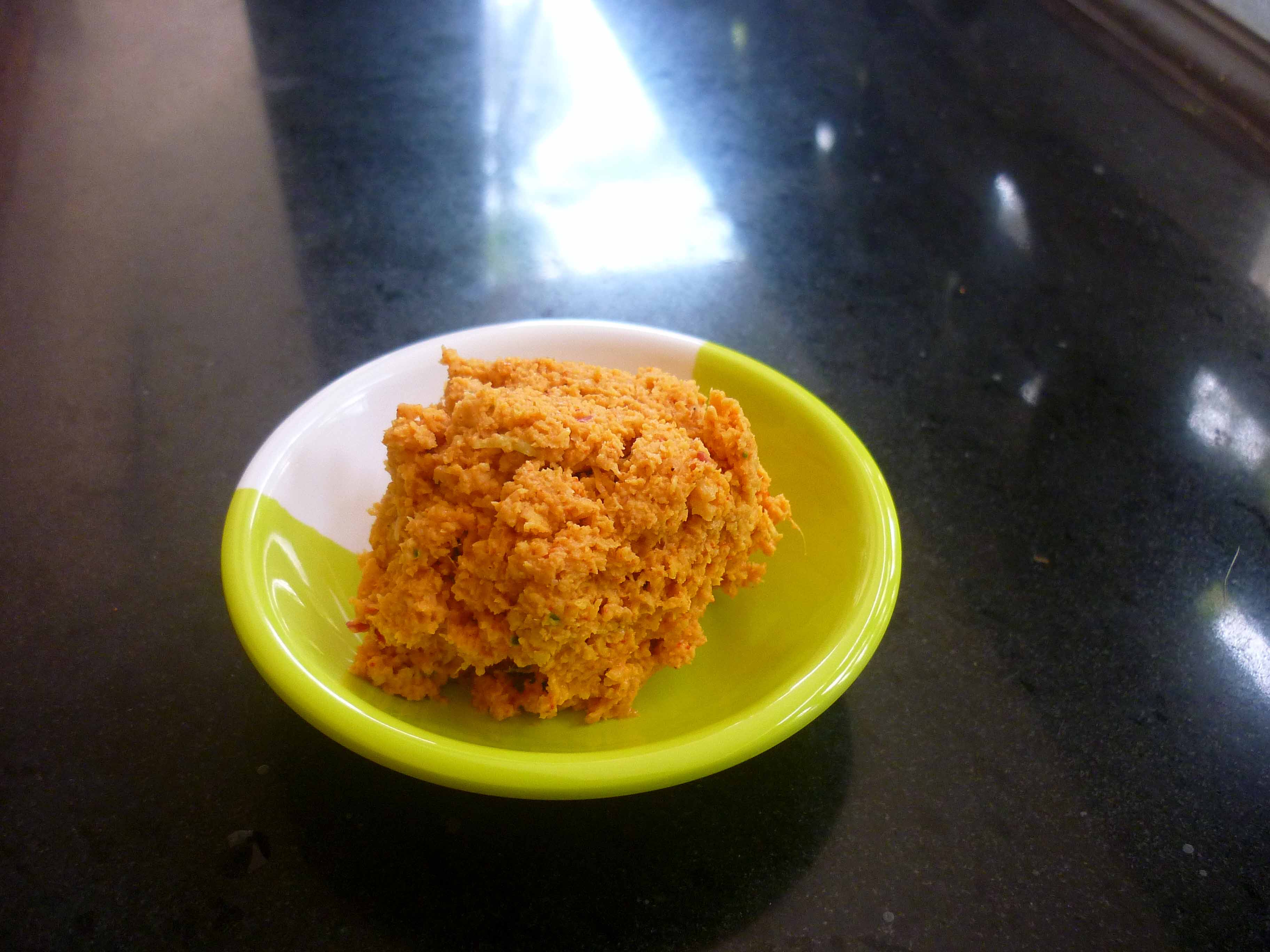 ചമ്മന്തി